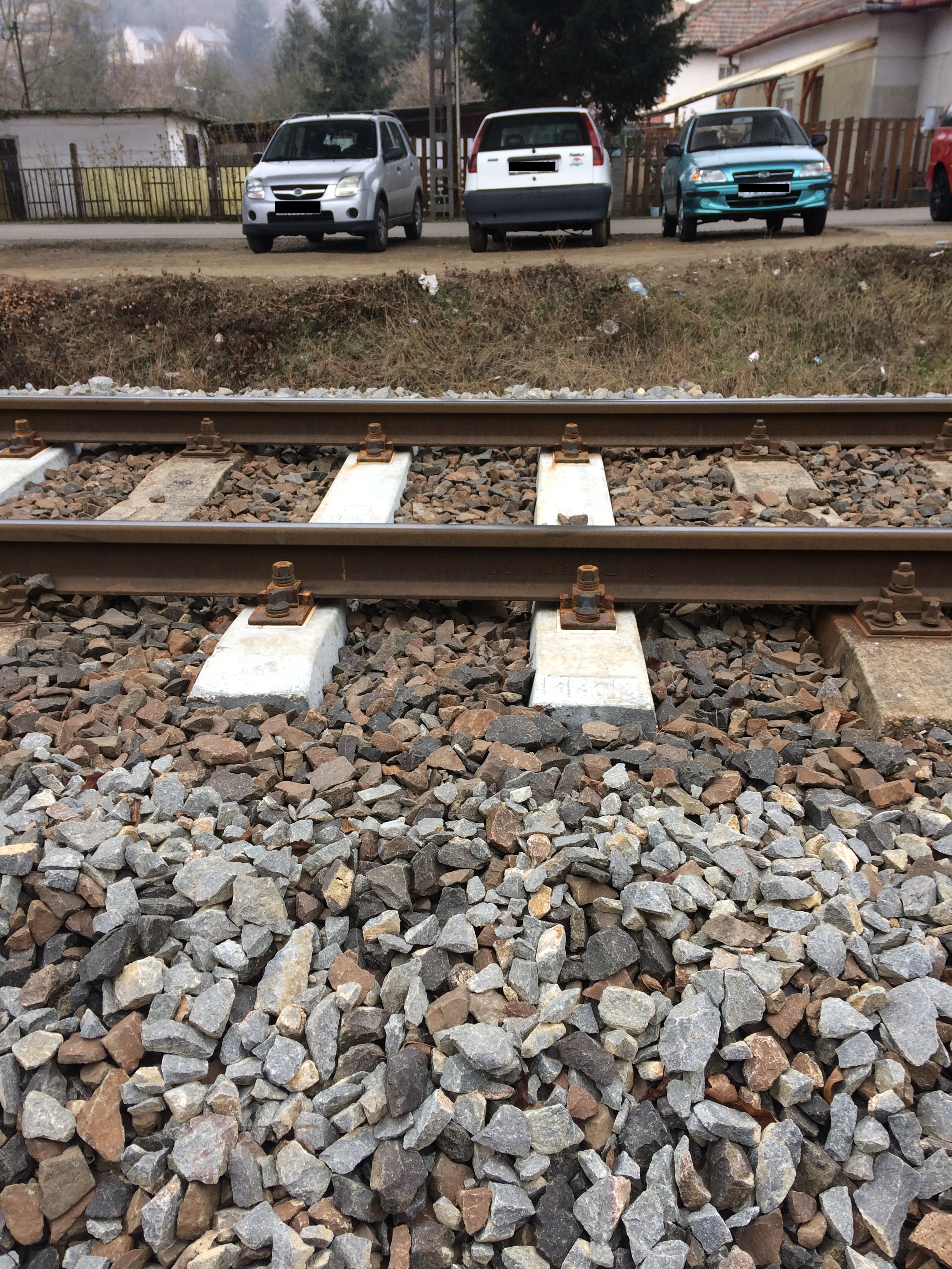 A Hatvan–Somoskőújfalu vasútvonal felépítményének egy részlete